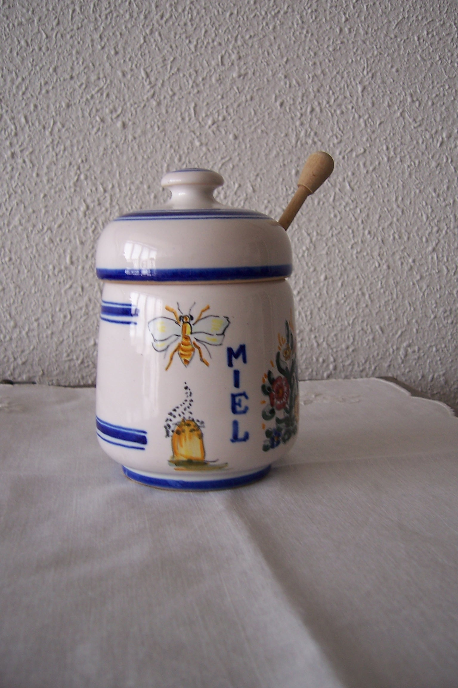 Tarro para la miel de cerámica tipo Talavera.